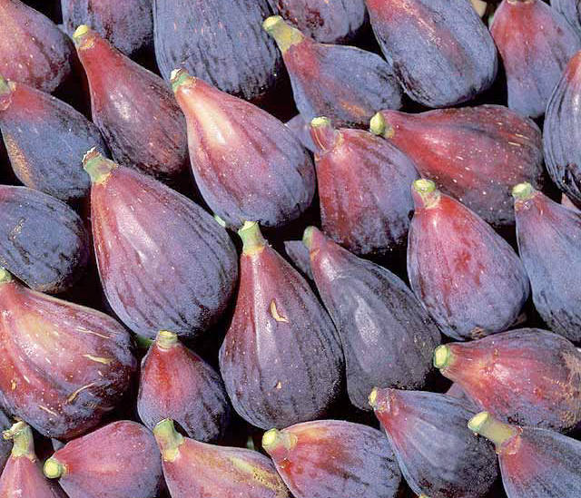 Feigen